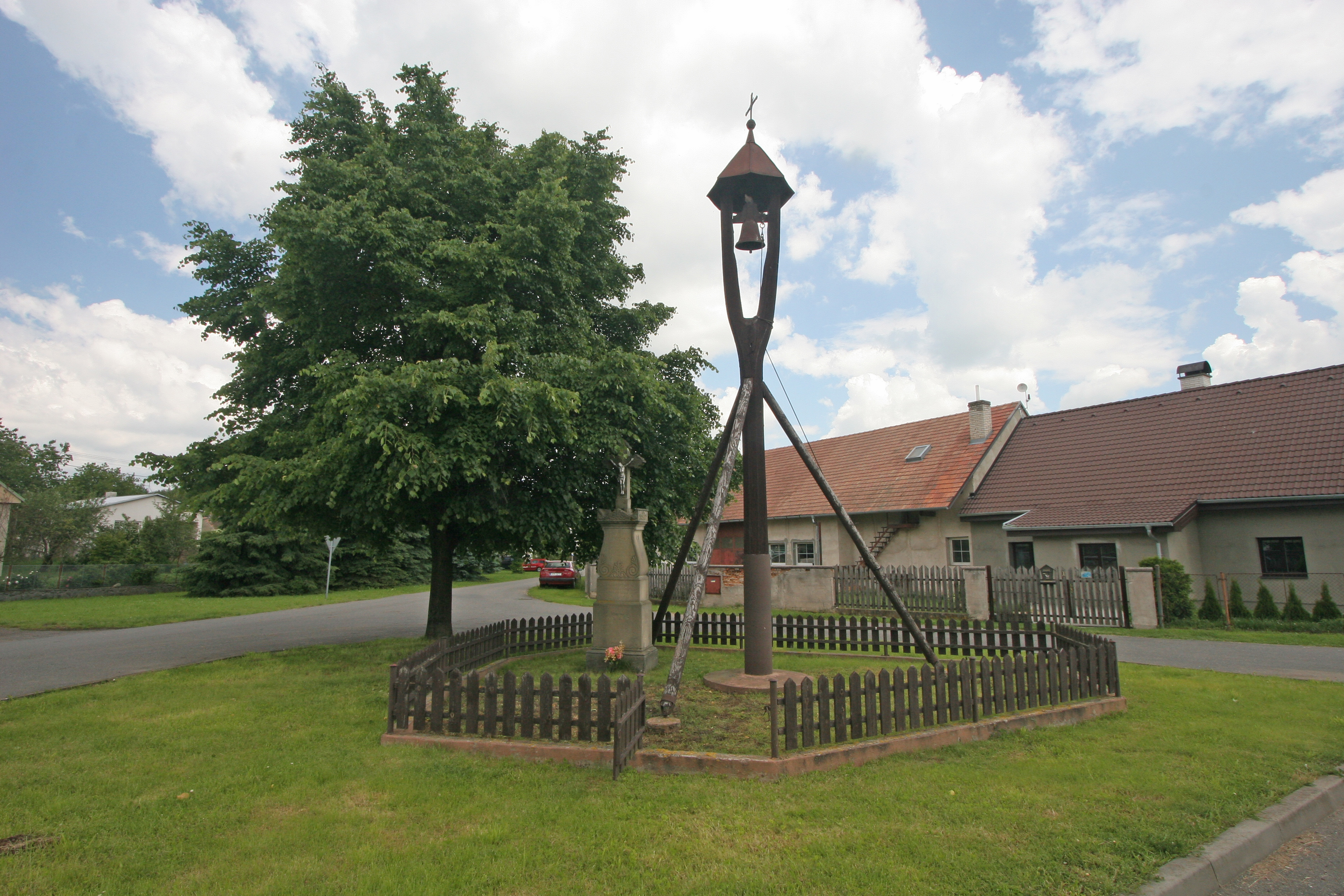 Zvonička (Svídnice), náves, Svídnice